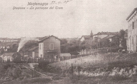 Montemagno, stazione tram